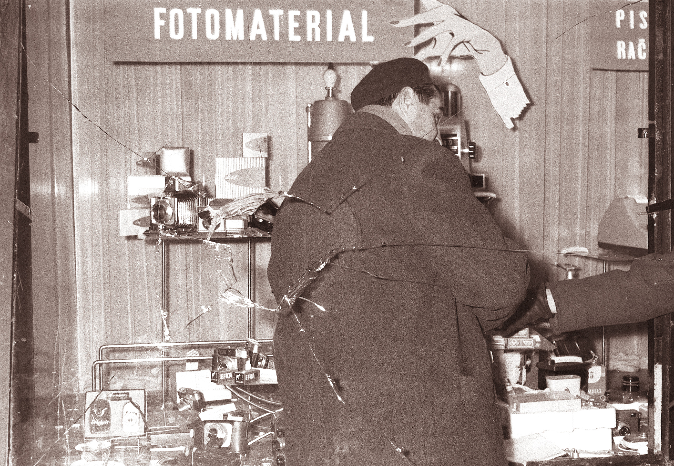 Poslovodja prodajalne Zarja v Gosposki ulici ugotavlja škodo po ropu